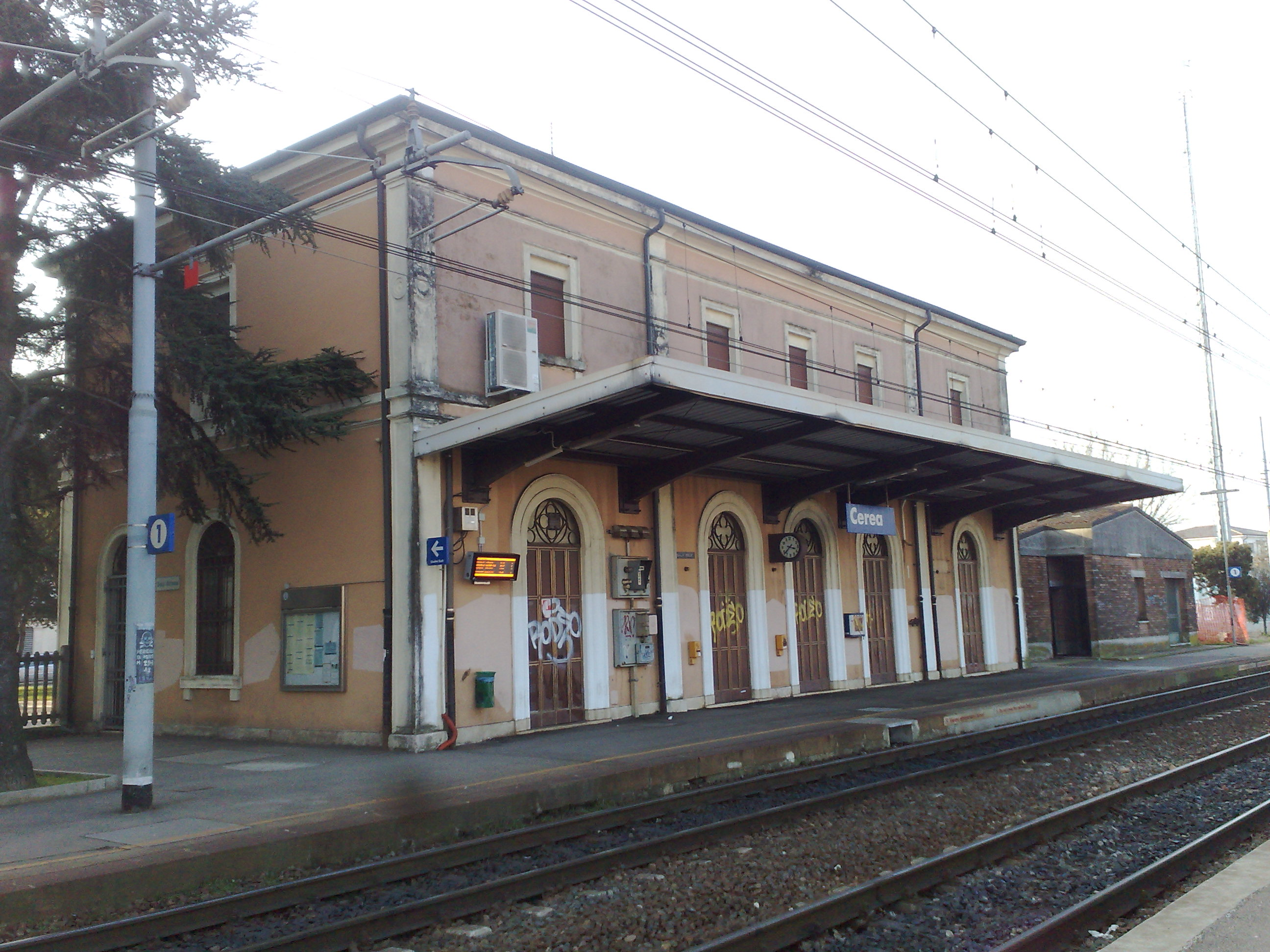 Piano binari della stazione di Cerea